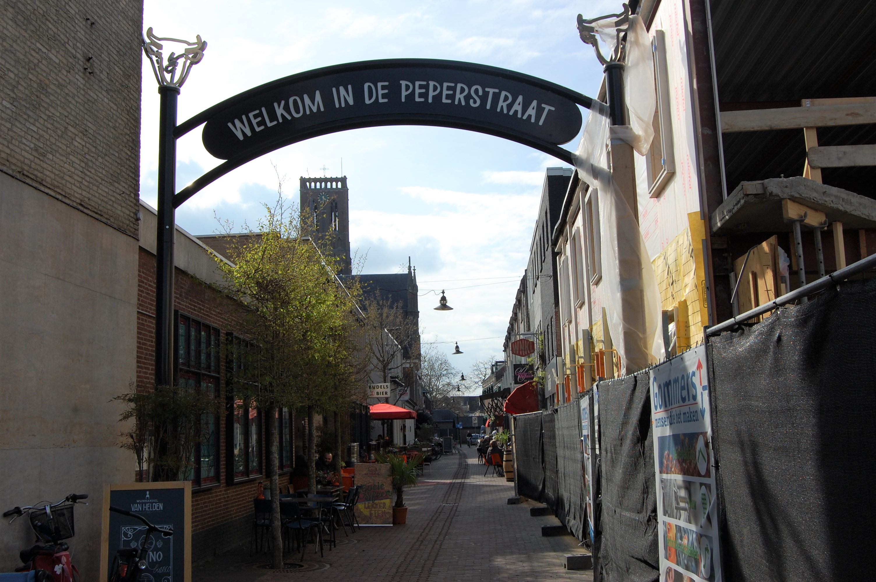 voorbeeld straatbeeld